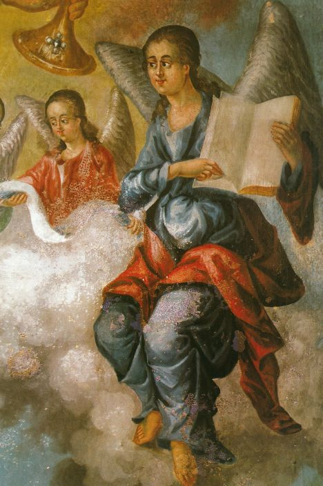 Детайл от икона на ангел от Тома Вишанов от края на XVIII век.